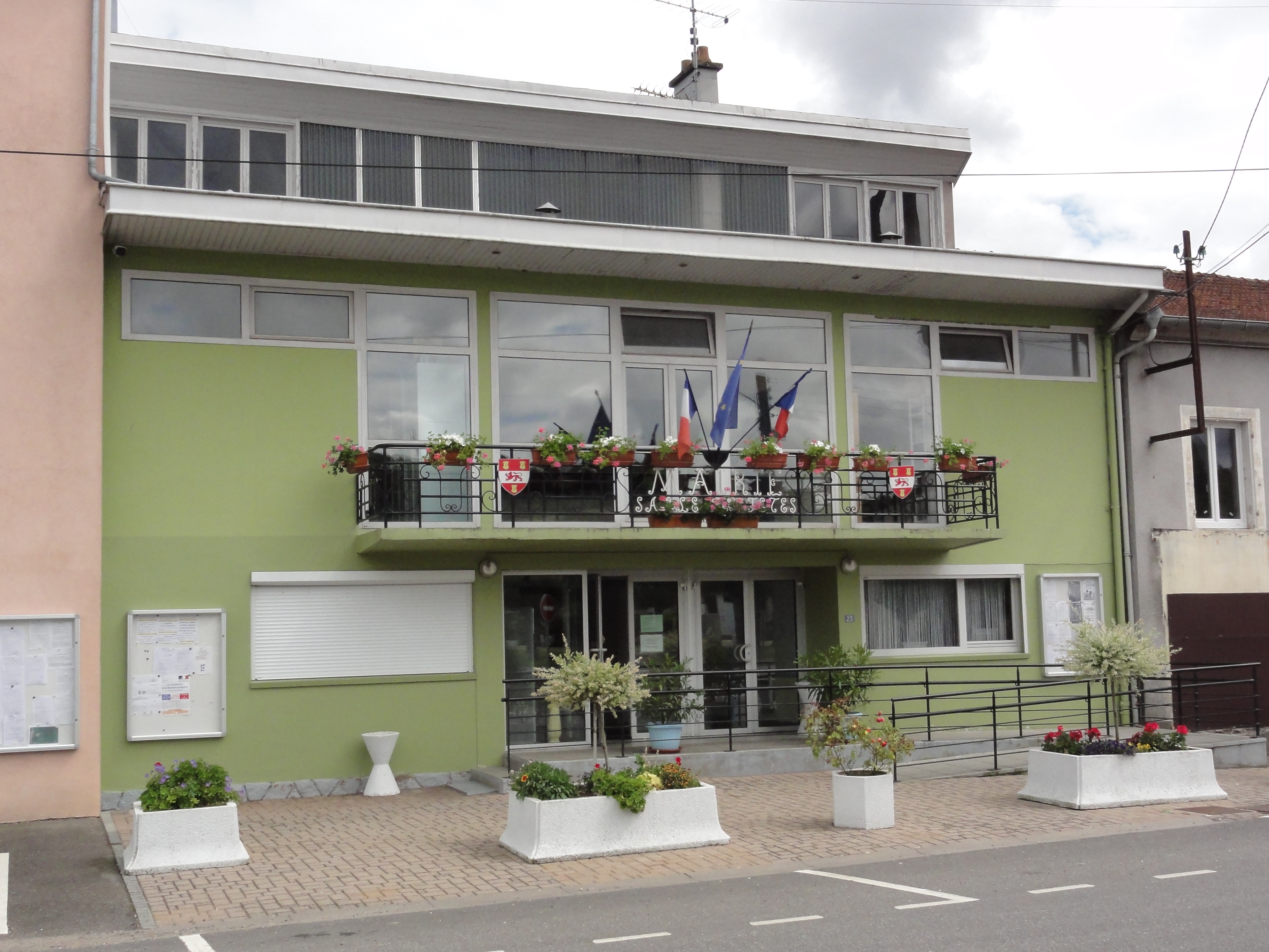 Roville-devant-Bayon (M-et-M) mairie - salle des fêtes